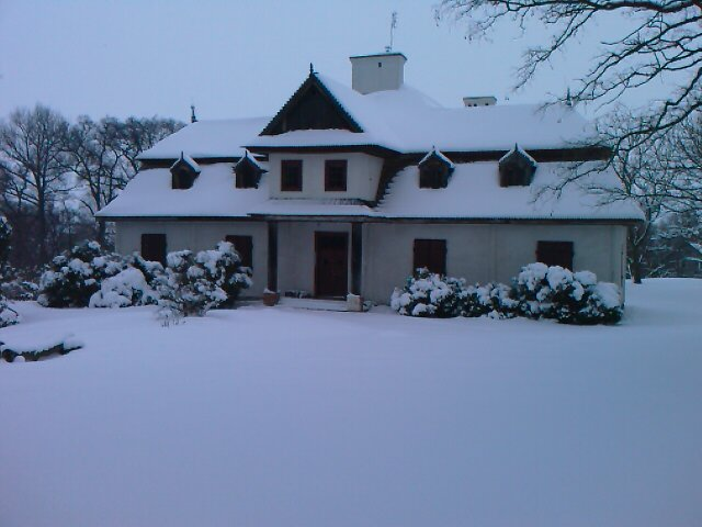 Stary Dwór w Goszycach - zima 2008